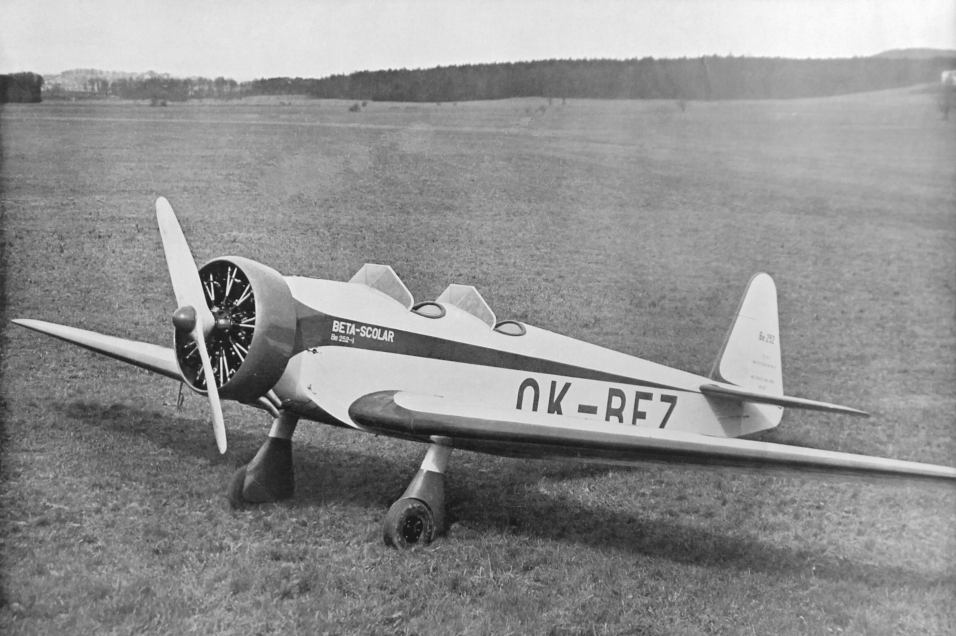 letecký motor Walter Scolar a letoun Beneš-Mráz Be-252 Scolar (1937)